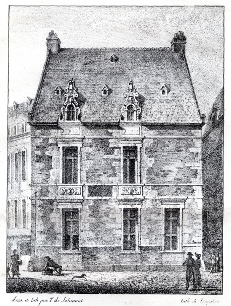 Lithographie représentant la maison de Malherbe